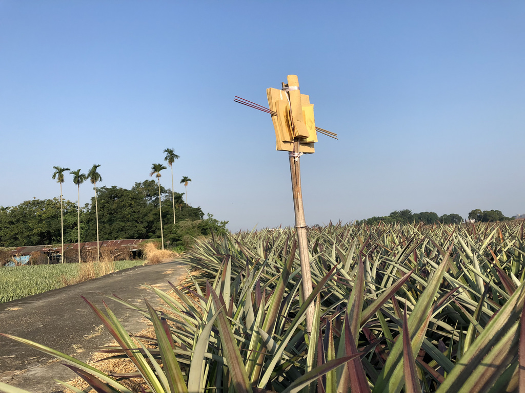 嘉義縣民雄鄉鳳梨田旁的土地公拐：中秋節後民間感謝土地公神，而將金紙和香包在拐杖上的祈福儀式。